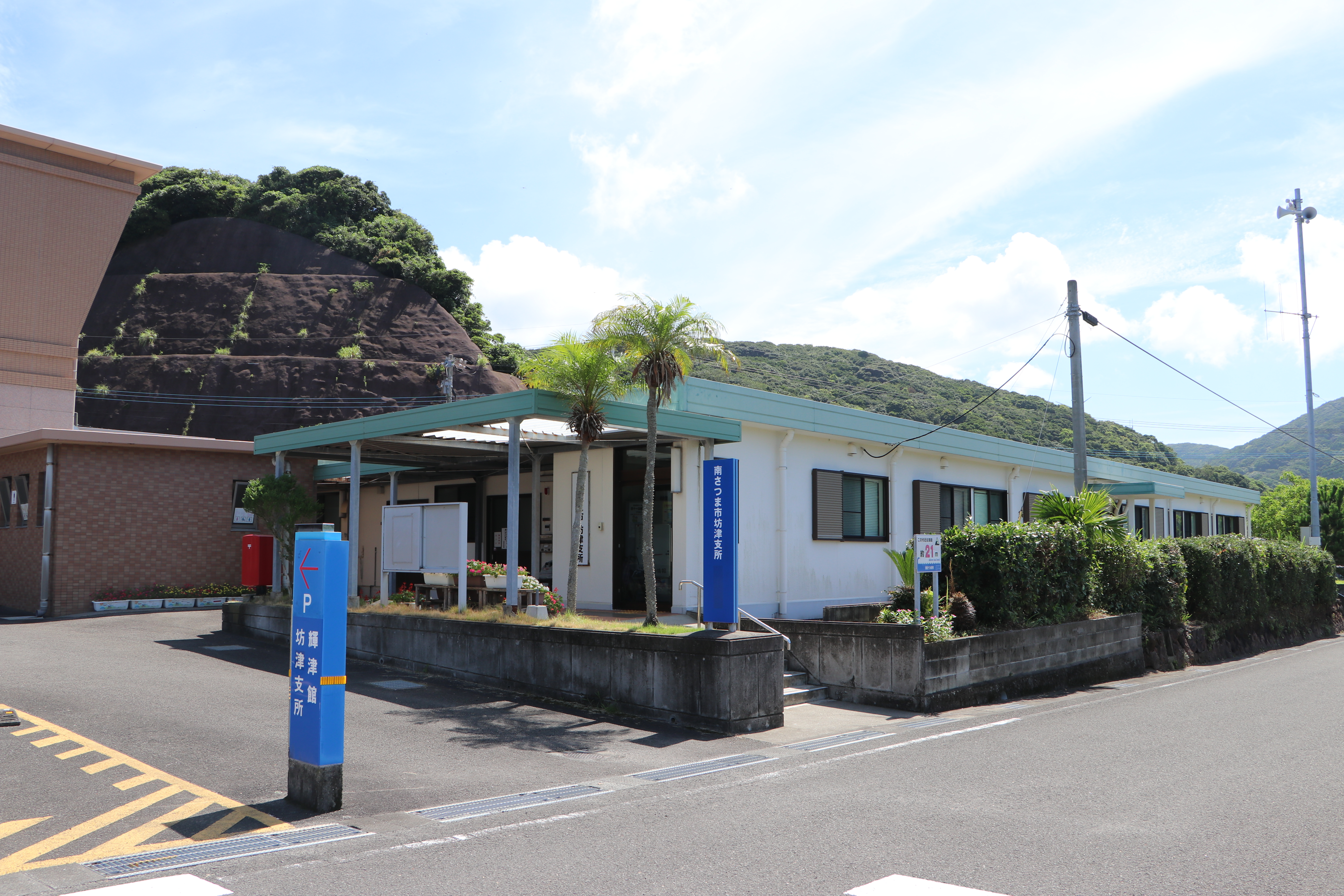 南さつま市立坊津支所の外観